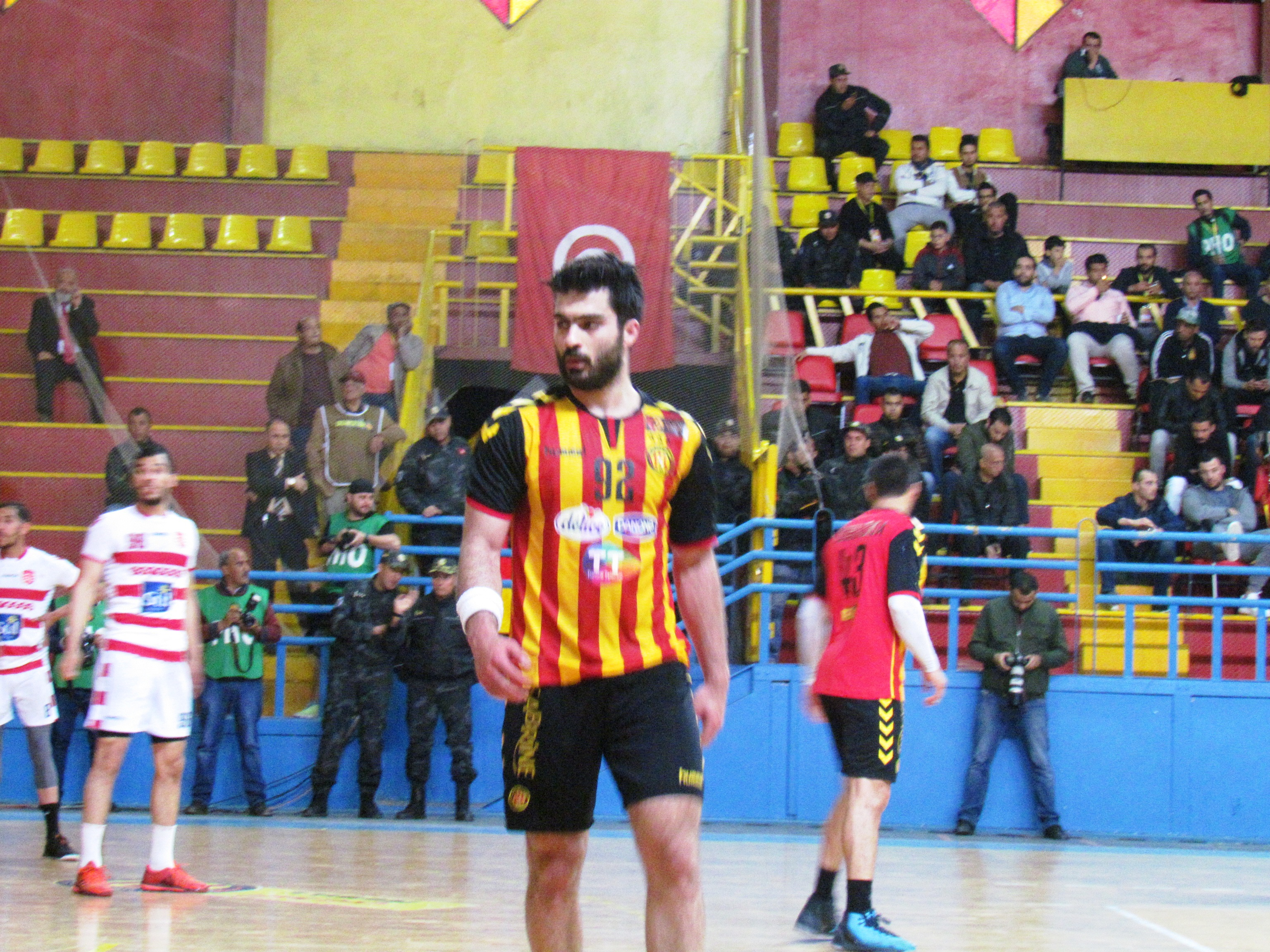 Oussama Jaziri lors du derby tunisois à la salle Zouaoui